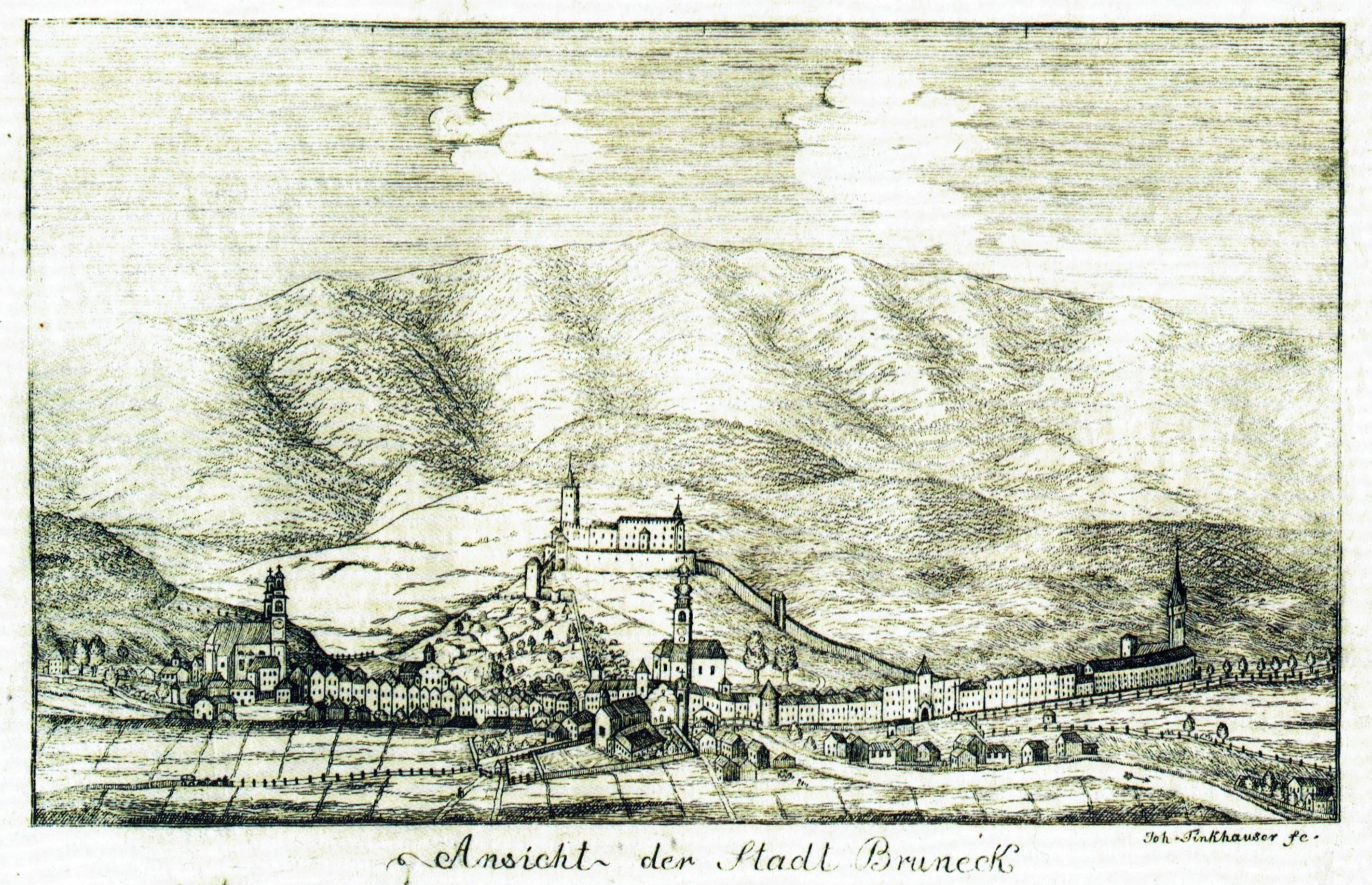 Ansicht von Bruneck, Radierung.